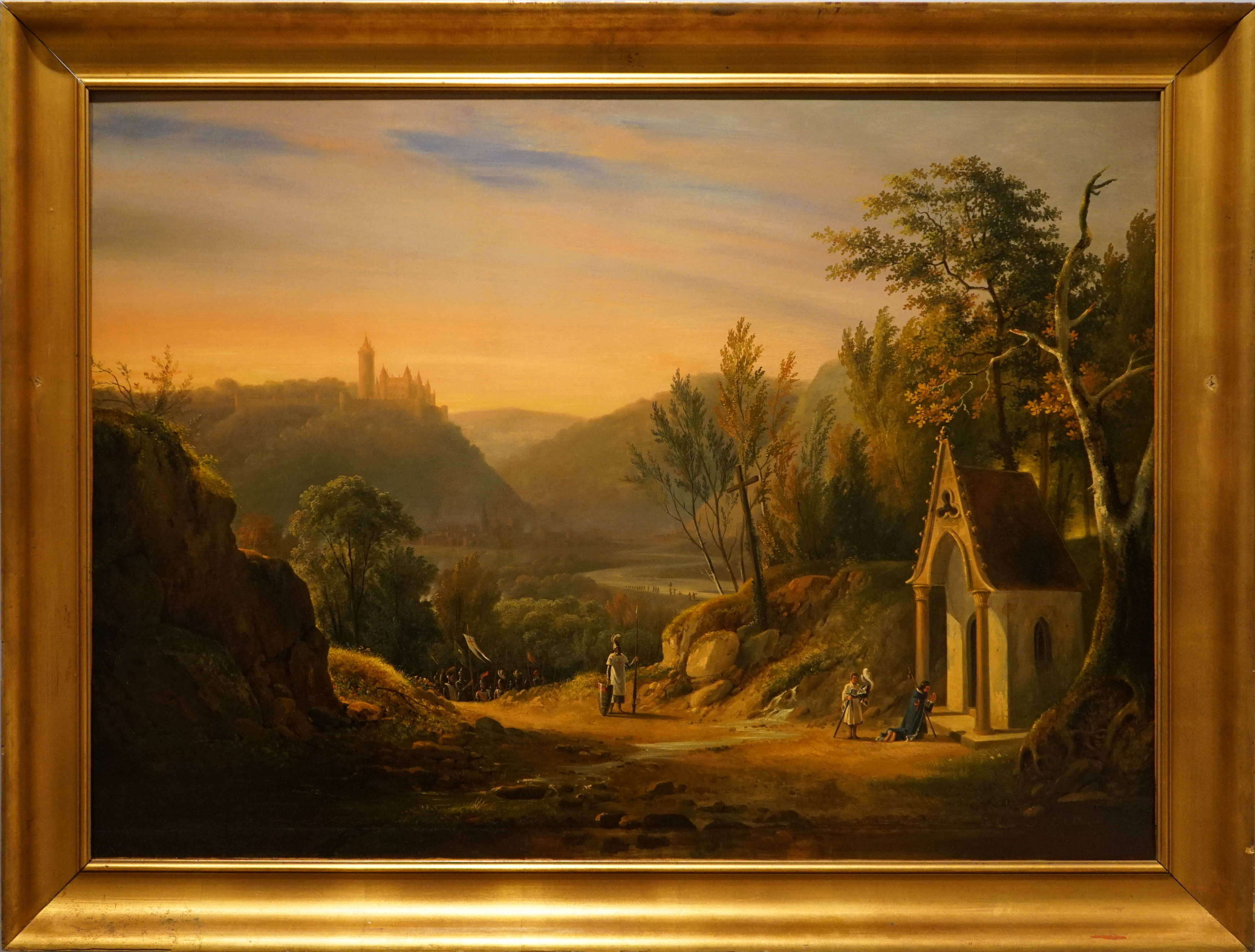 présenté au musée de Chaumont.